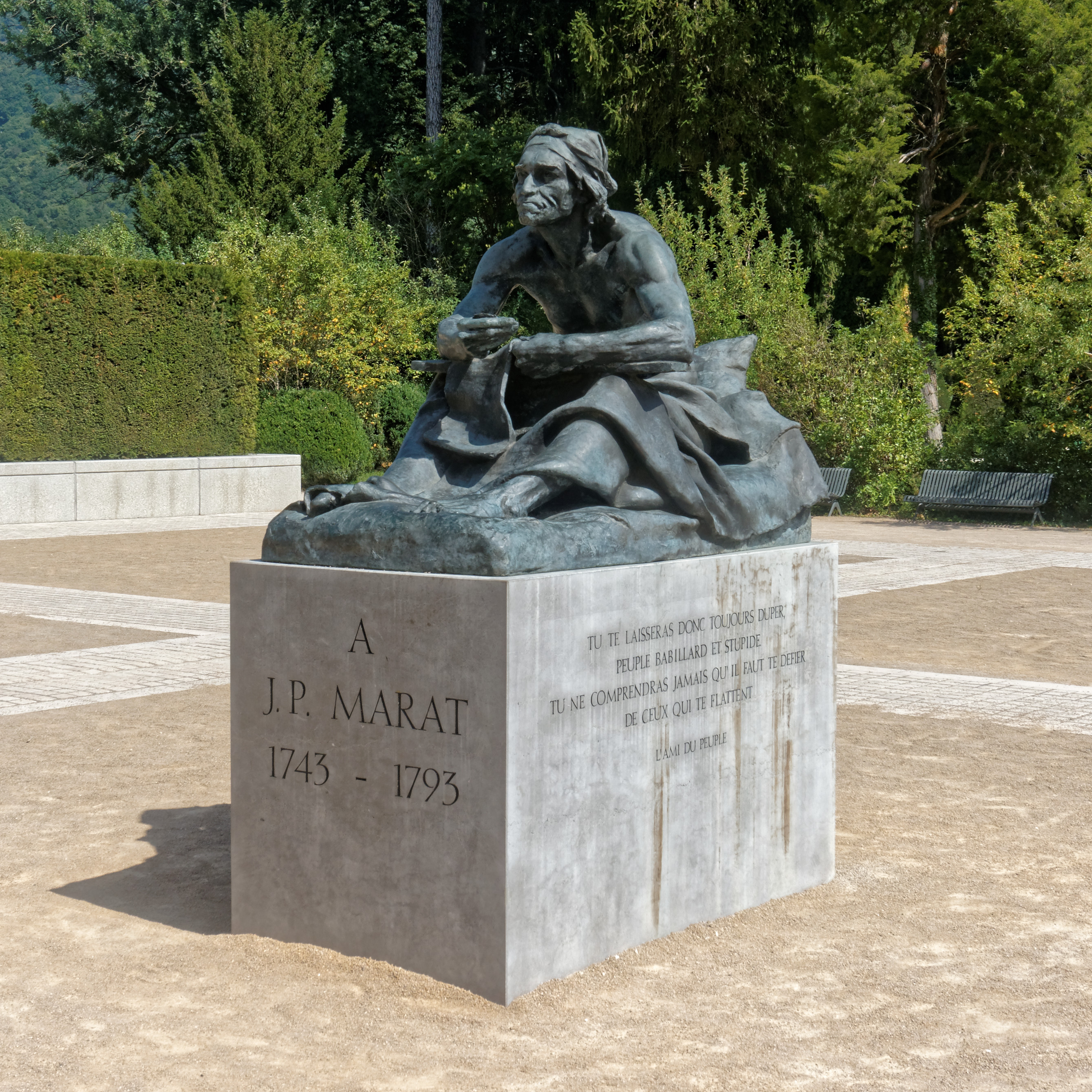 Statue de Marat au château de Vizille